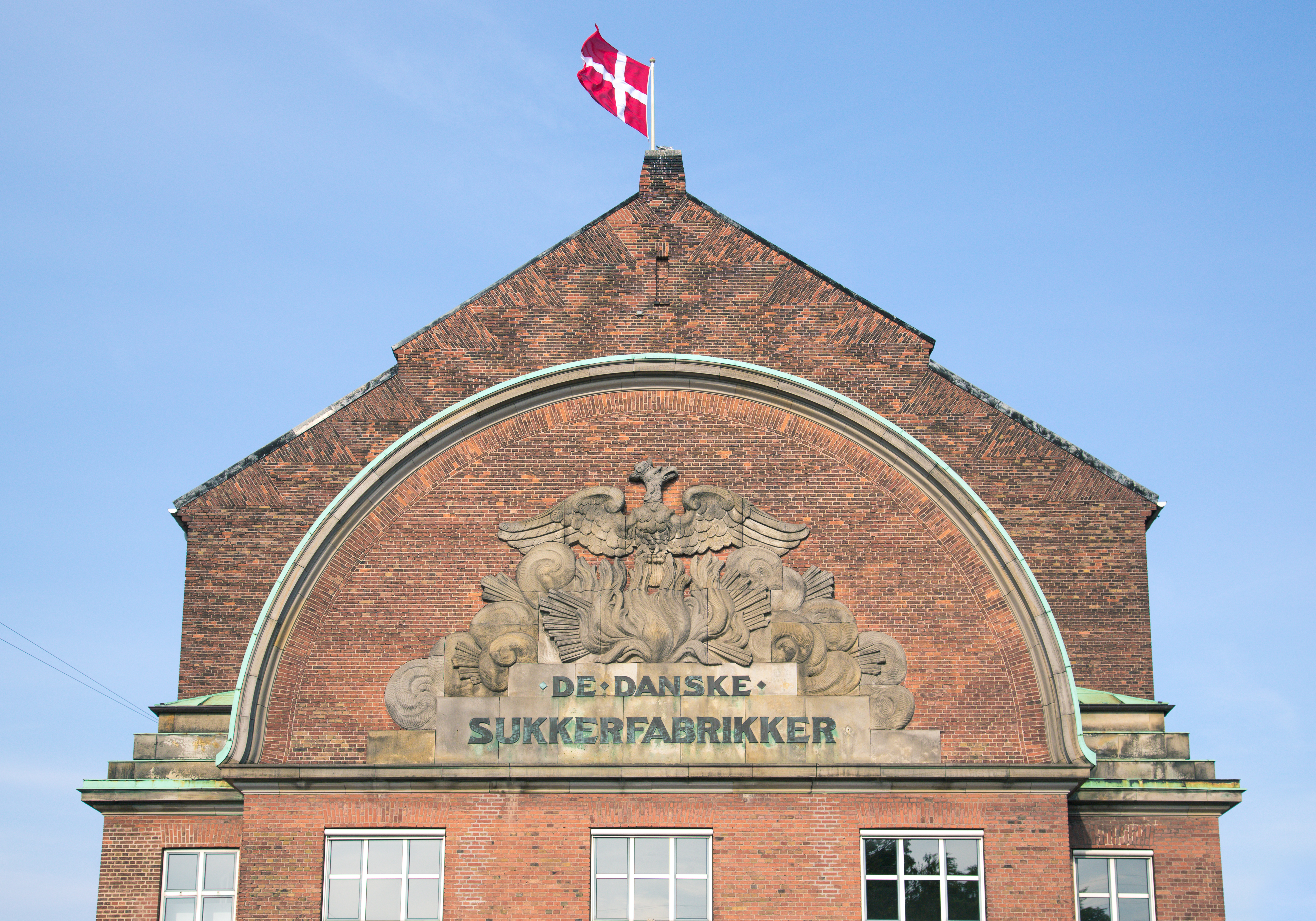 Copenhagen, Denmark Licensing